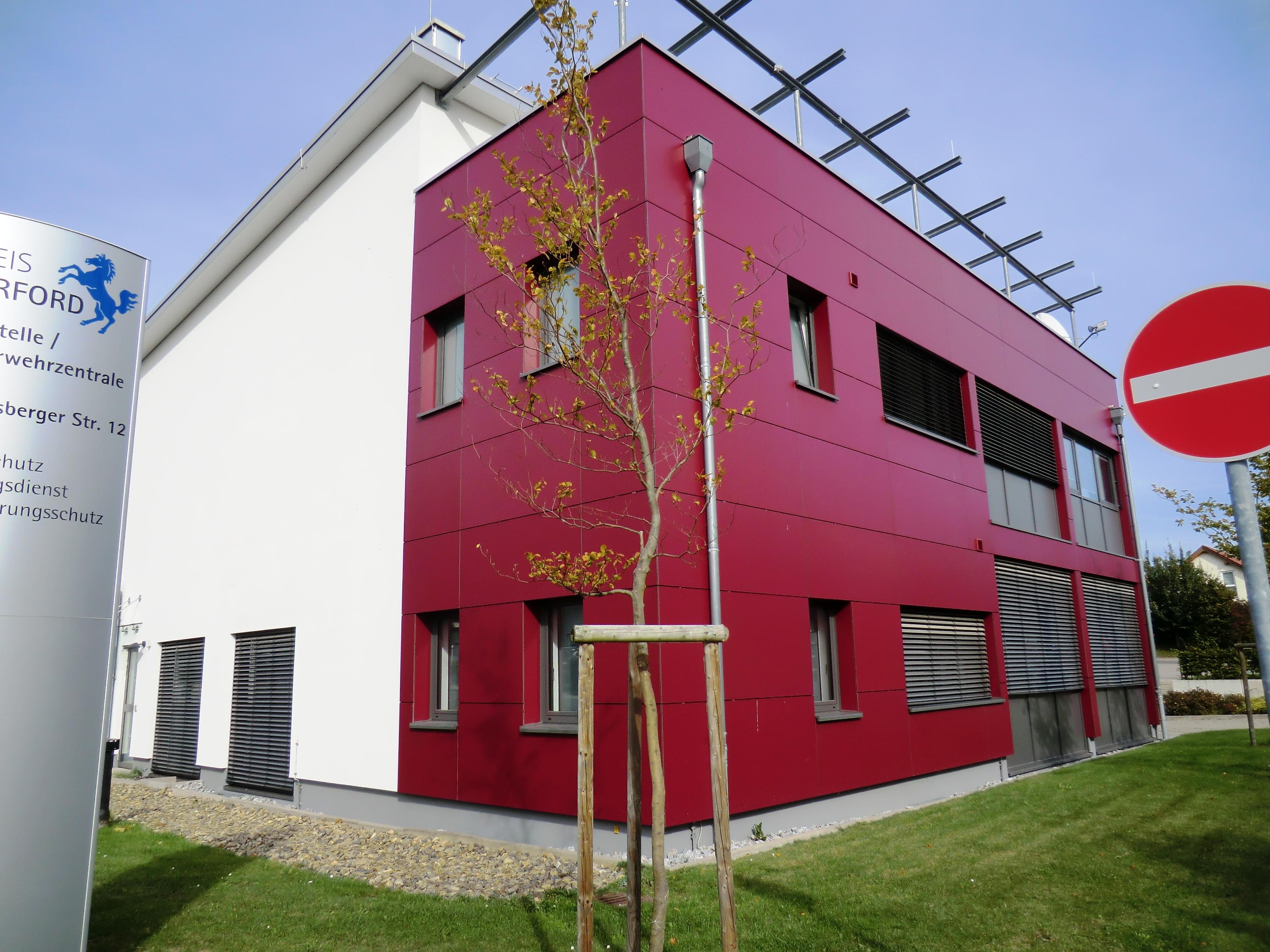 Kreisfeuerwehrzentrale Kreis Herford. Standort Eilshausen, Königsberger Straße 12 / Meierstraße 43.